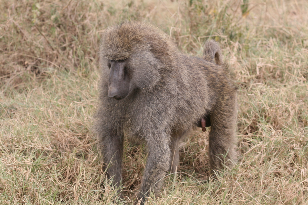 Olive Baboon or Anubis Baboon at Lake Nakuru, Kenya